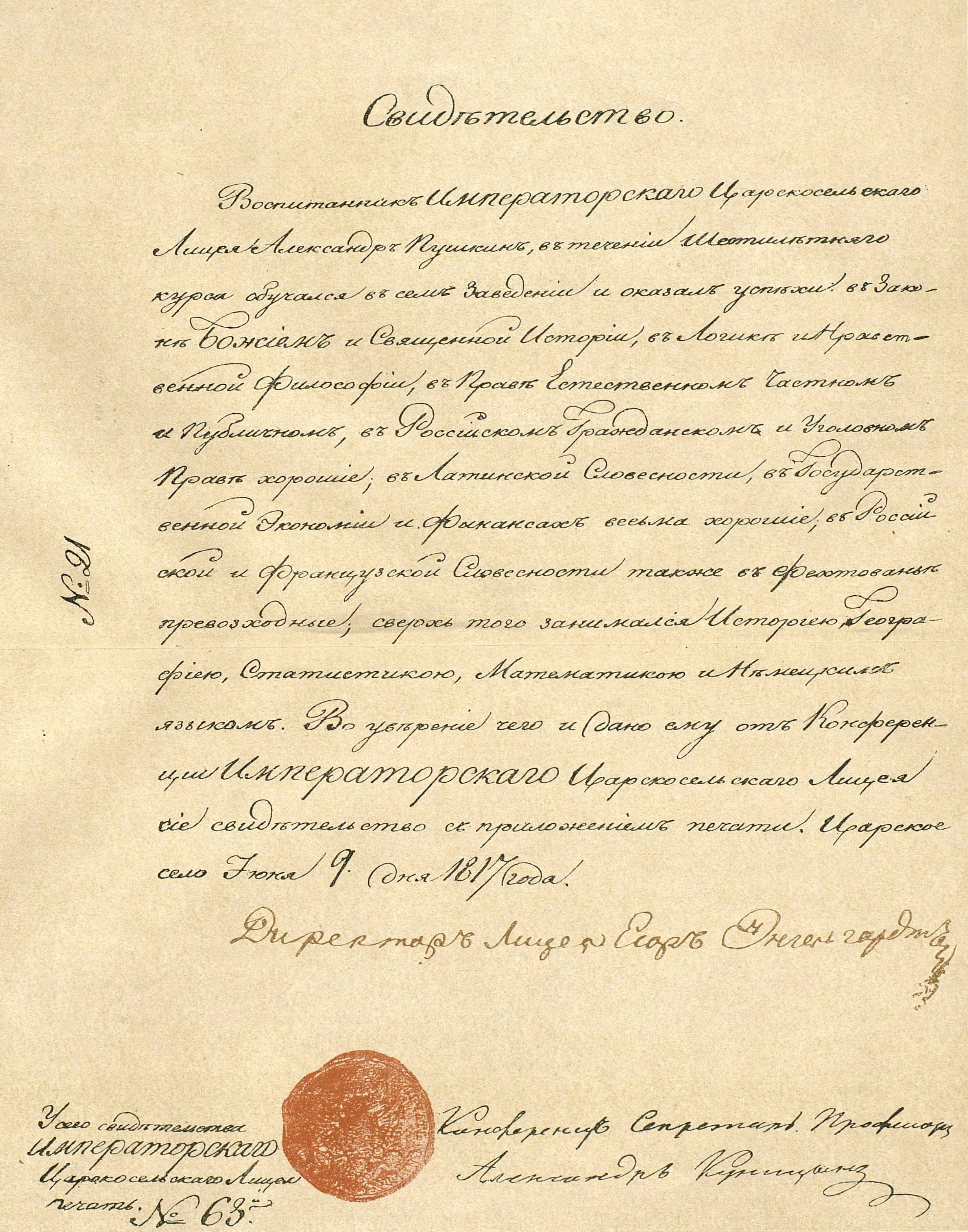 Свидетельство об окончании А. С. Пушкиным лицея, выданное 9 июня 1817 года